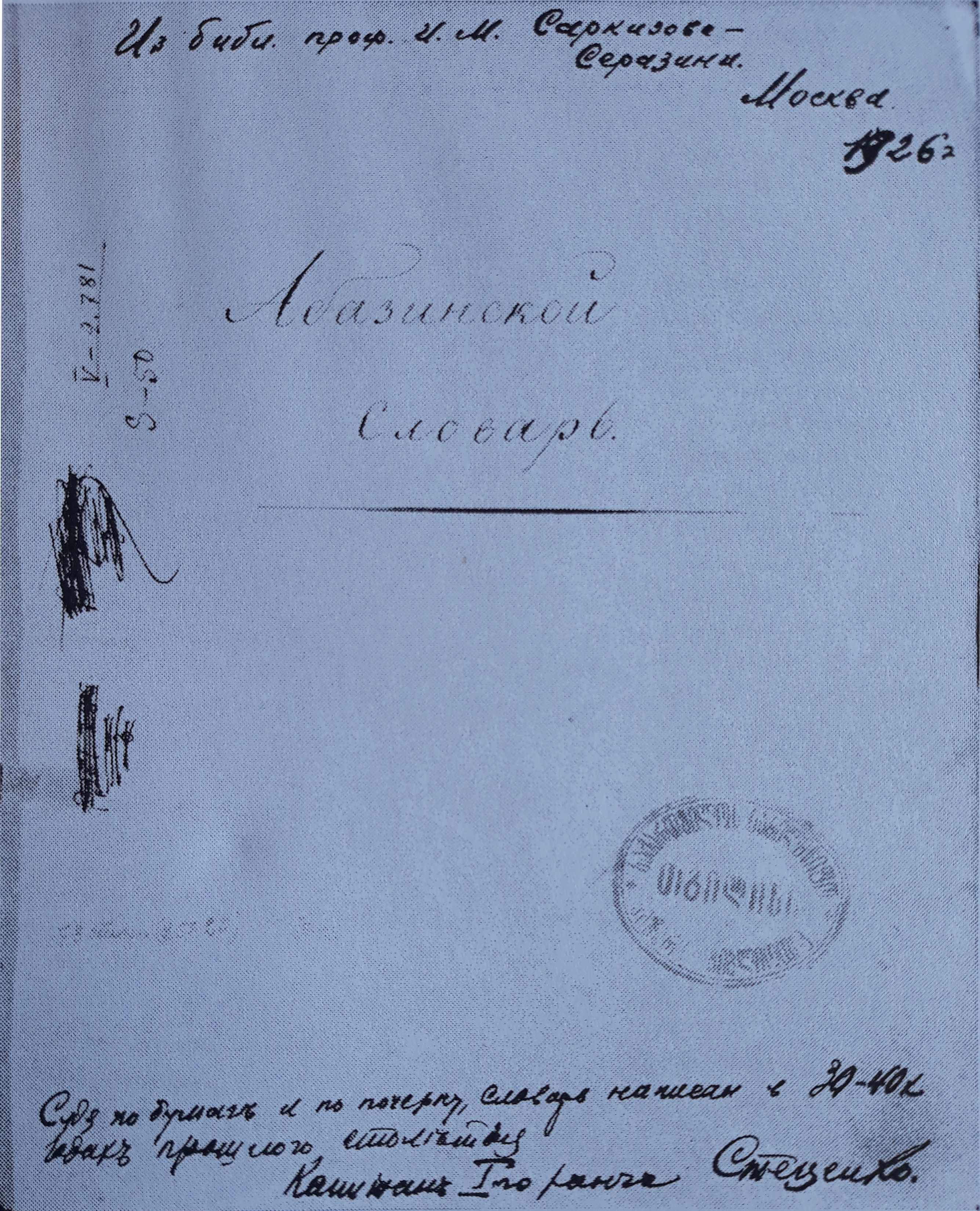 რუსულ აფხაზური ლექსიკონი